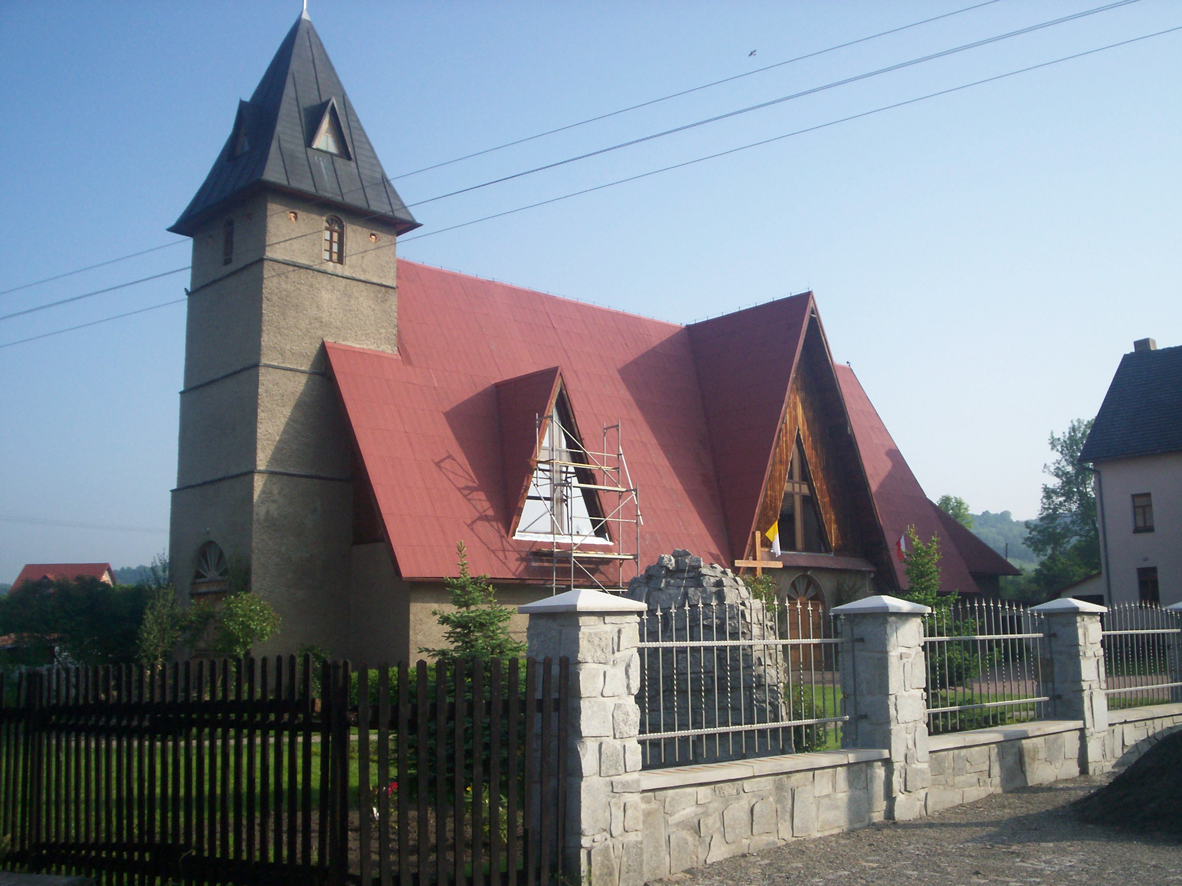 Jeżów Sudecki, kościół św. Stanisława Biskupa.